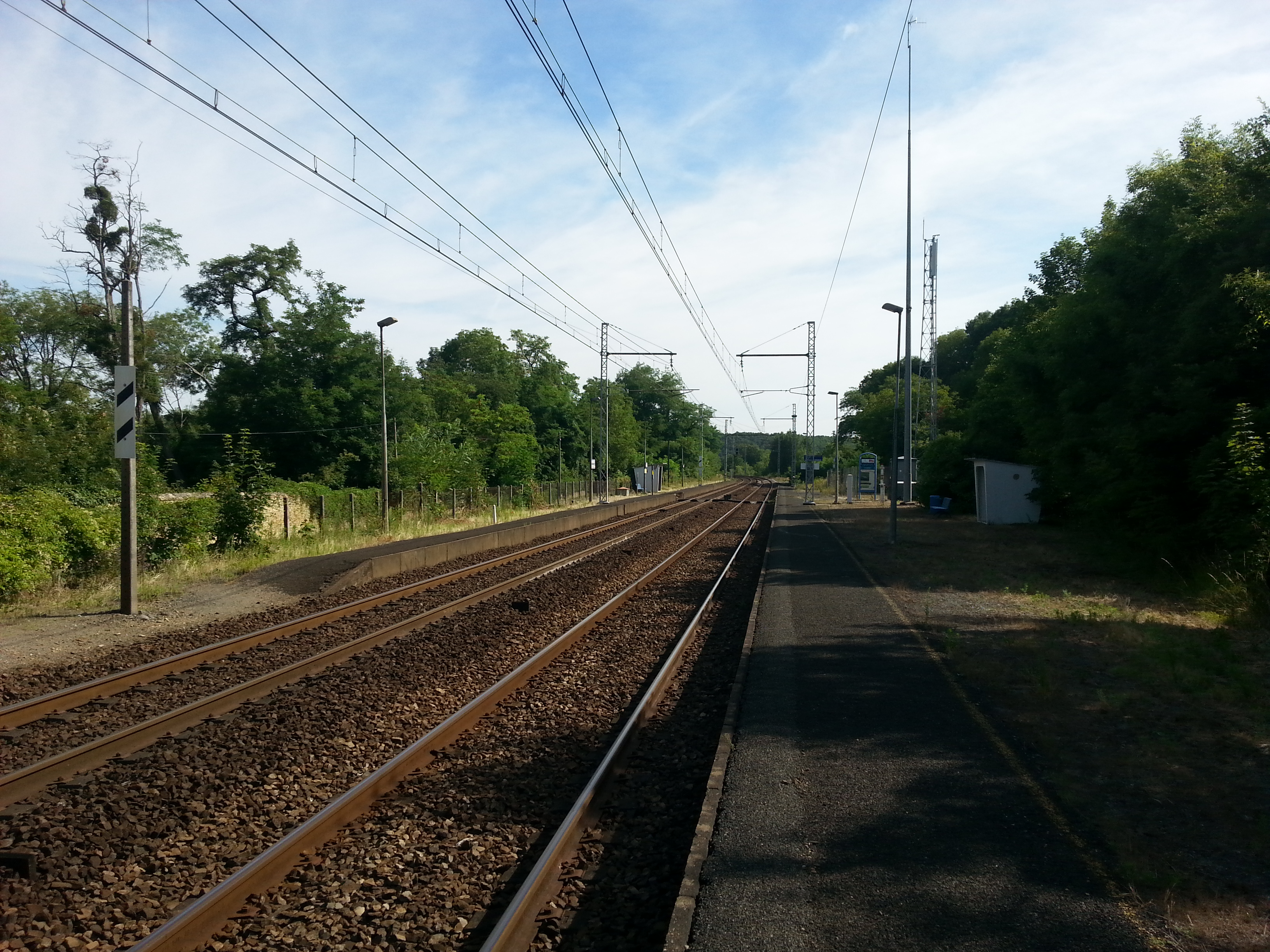 Gare de Chabenet (36) : Vue générale de la gare, depuis le quai pour Limoges.